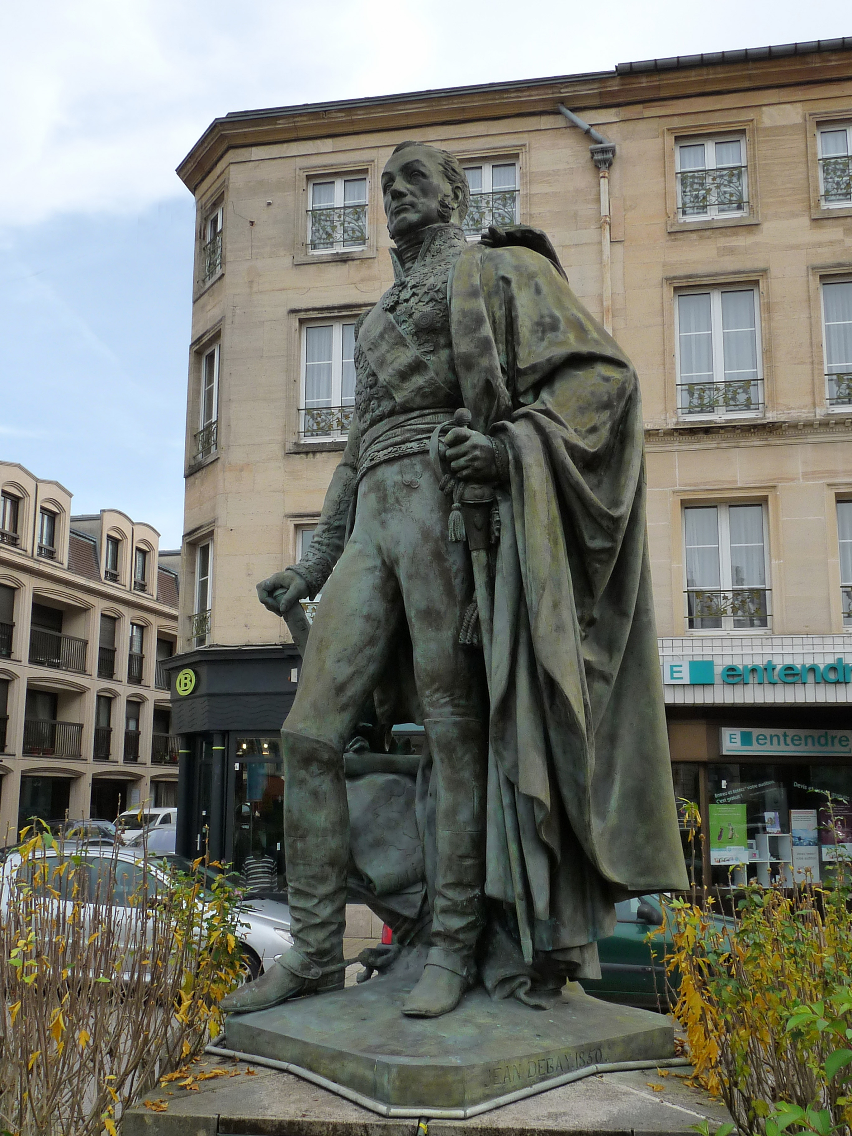 Bar-le-Duc, place Reggio : Monument en bronze au général Oudinot (Nicolas-Charles) par Jean-Baptiste Debay fils (1802-1862).